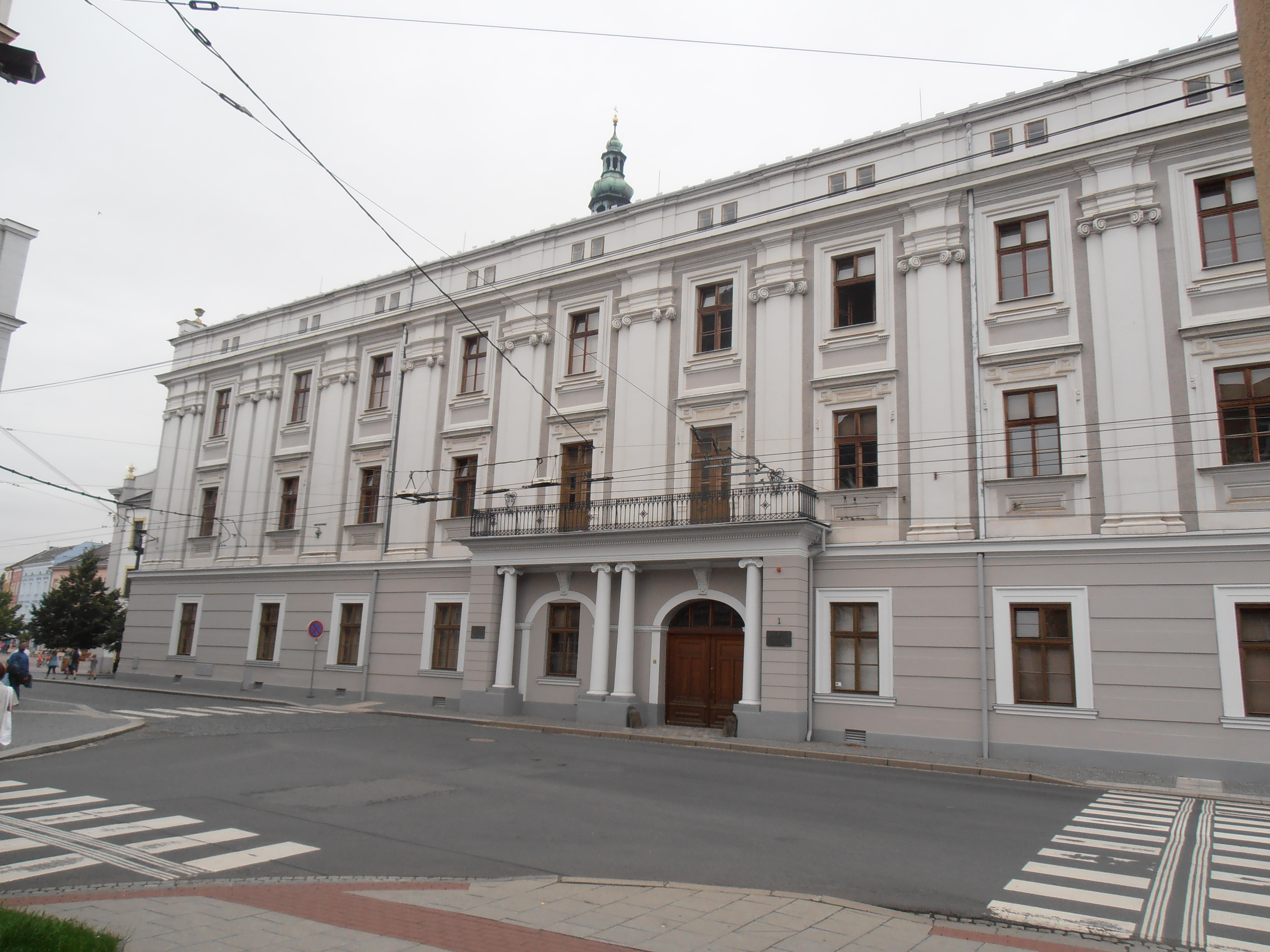 Sněmovna, Sněmovní 2/1, Opava-Město, Opava.